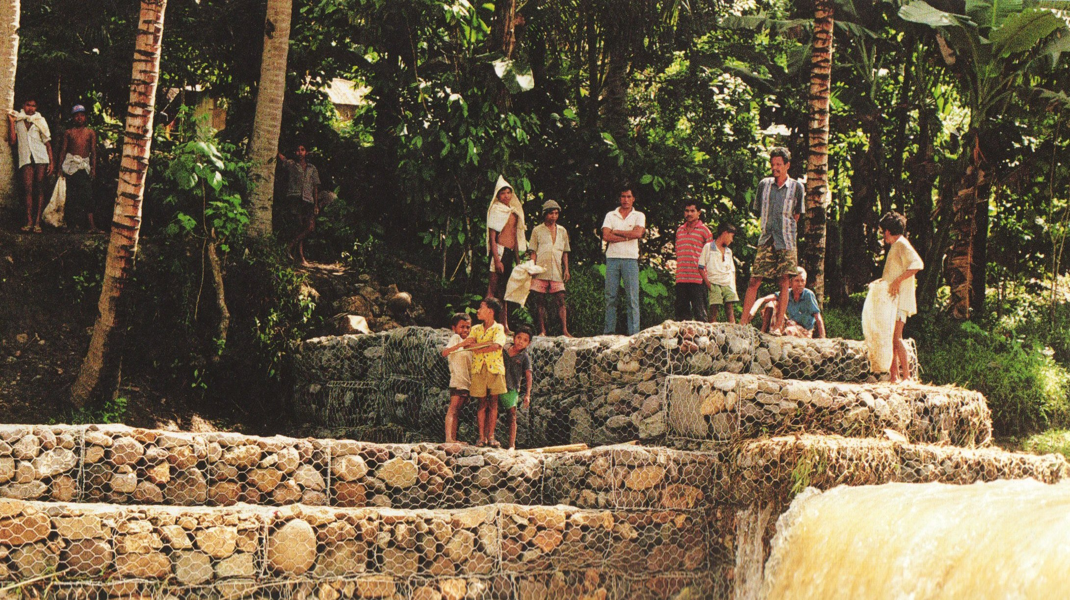 Protección de márgenes por medio de gabiones Autor: Alfredobi Fecha: 1999 Lugar Seja de selva en el Perú